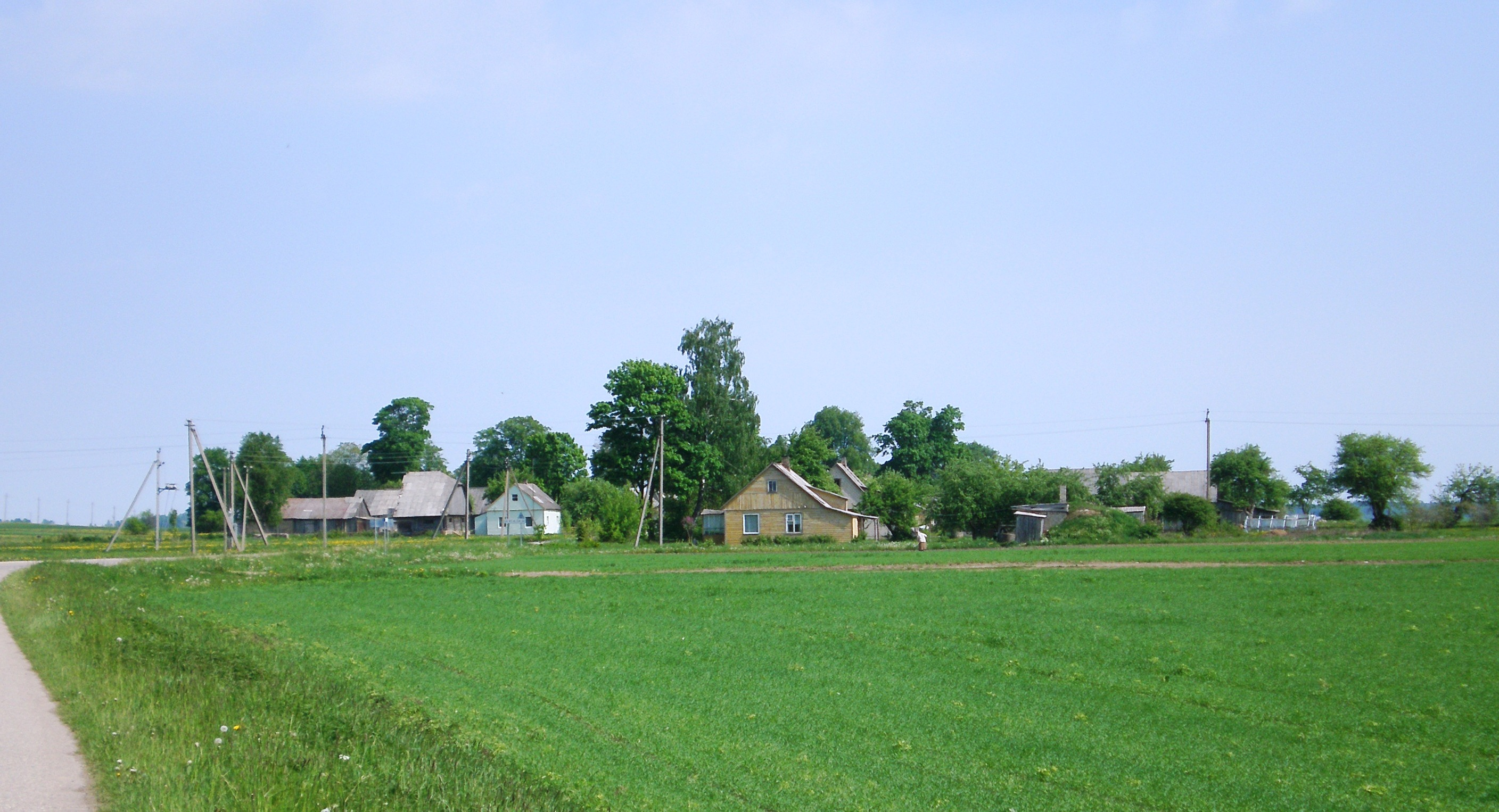 Deveikiškiai, Kėdainių raj.